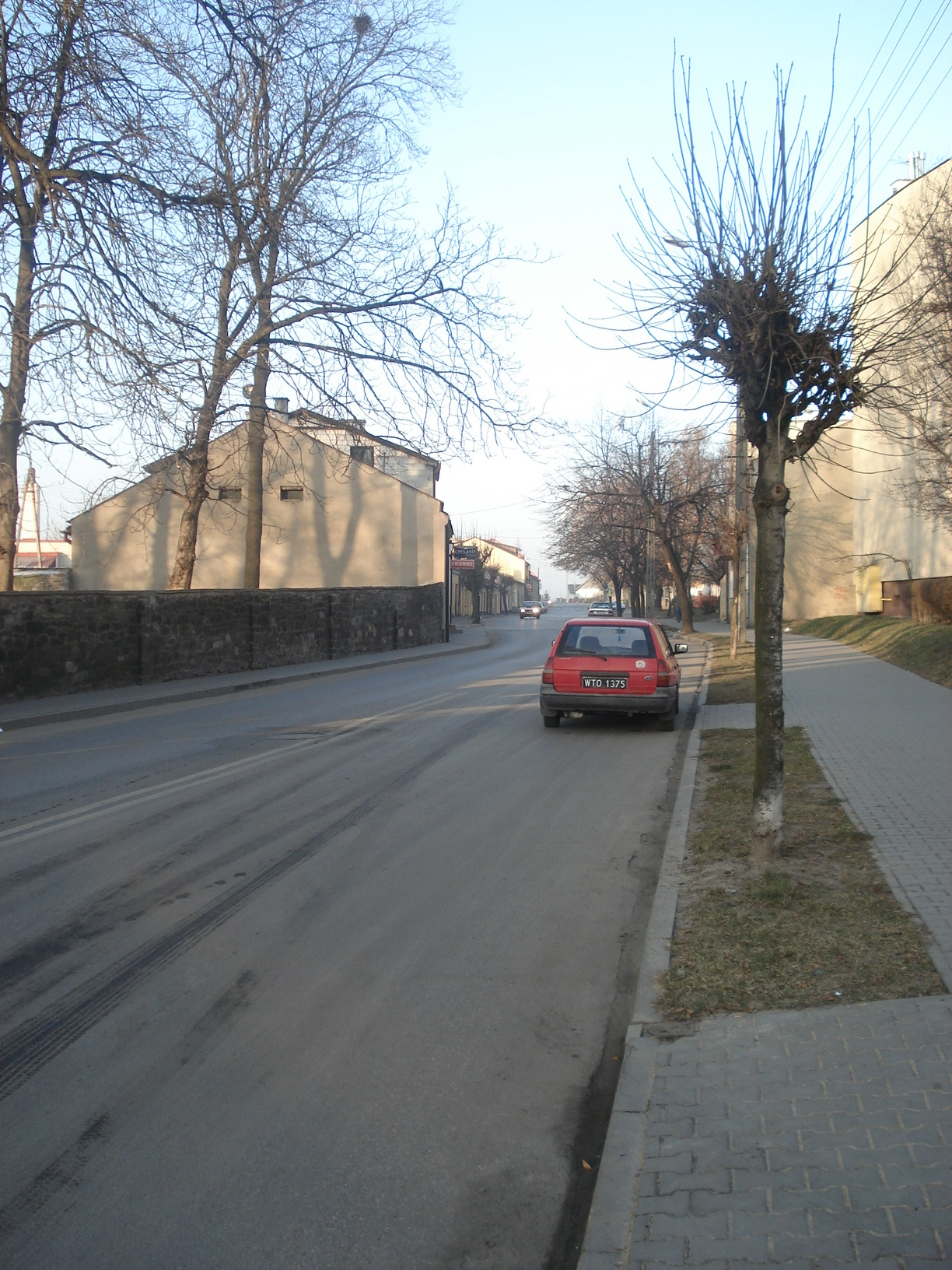 ul. Radomska w Szydłowcu na wys. skrzyżowania z ul. Zamkową